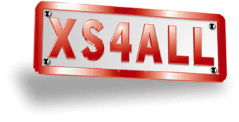 Logo XS4all Internet NV Belgium